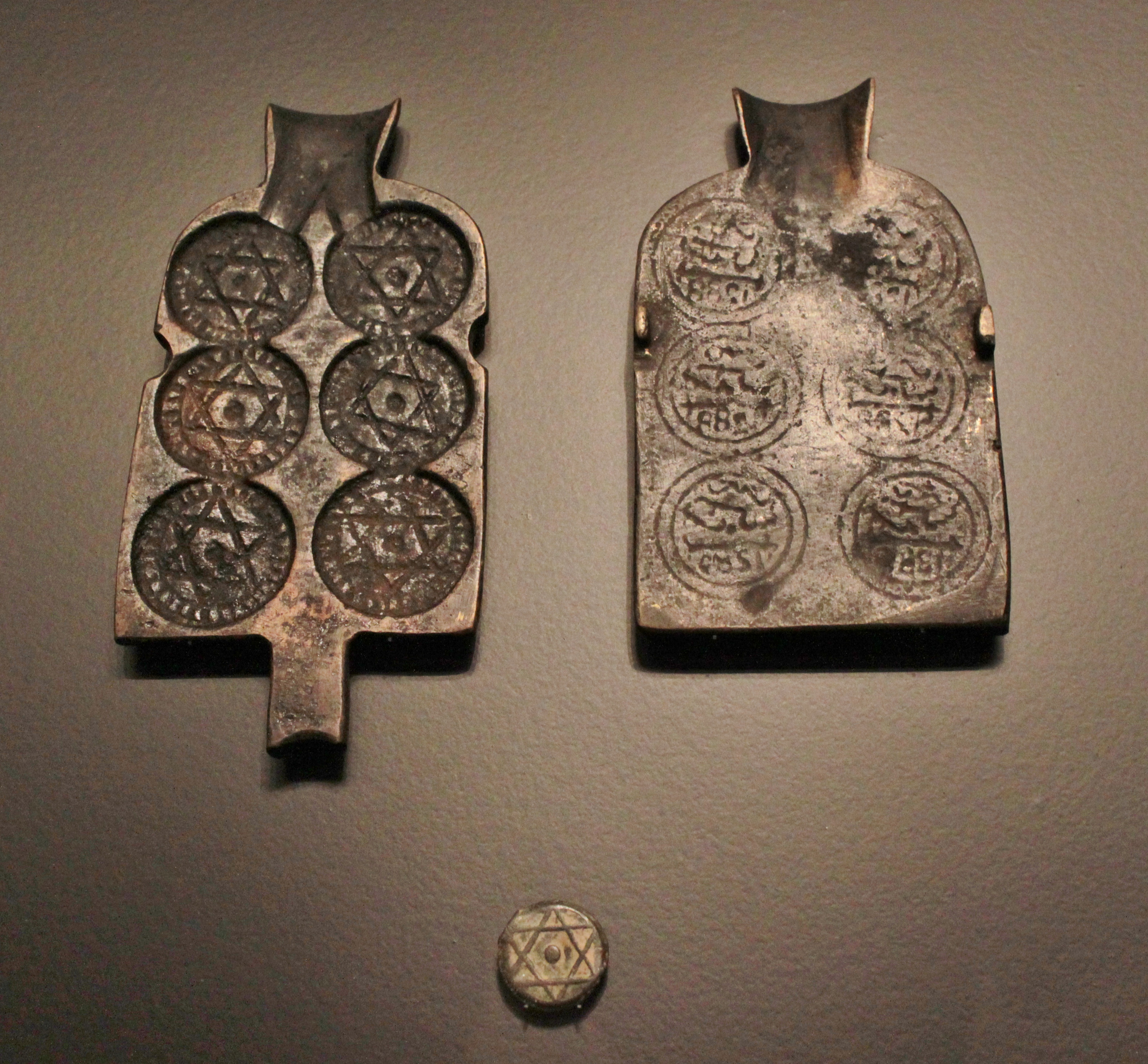 Molde para feluses de Marruecos y muestra de la moneda, años 1871-1872. Exposición Historia del dinero. Depositada en el Museo de Prehistoria de Valencia, Comunidad valenciana, España.